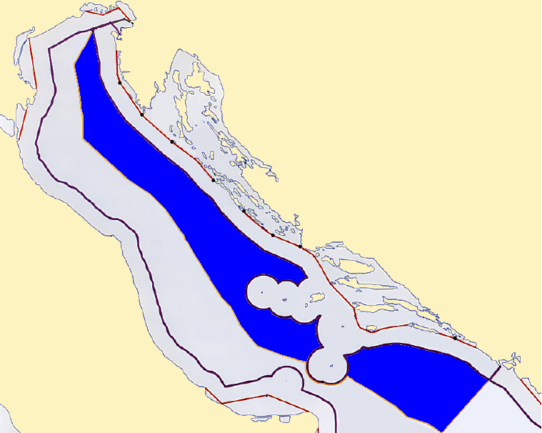 Adriatic sea map